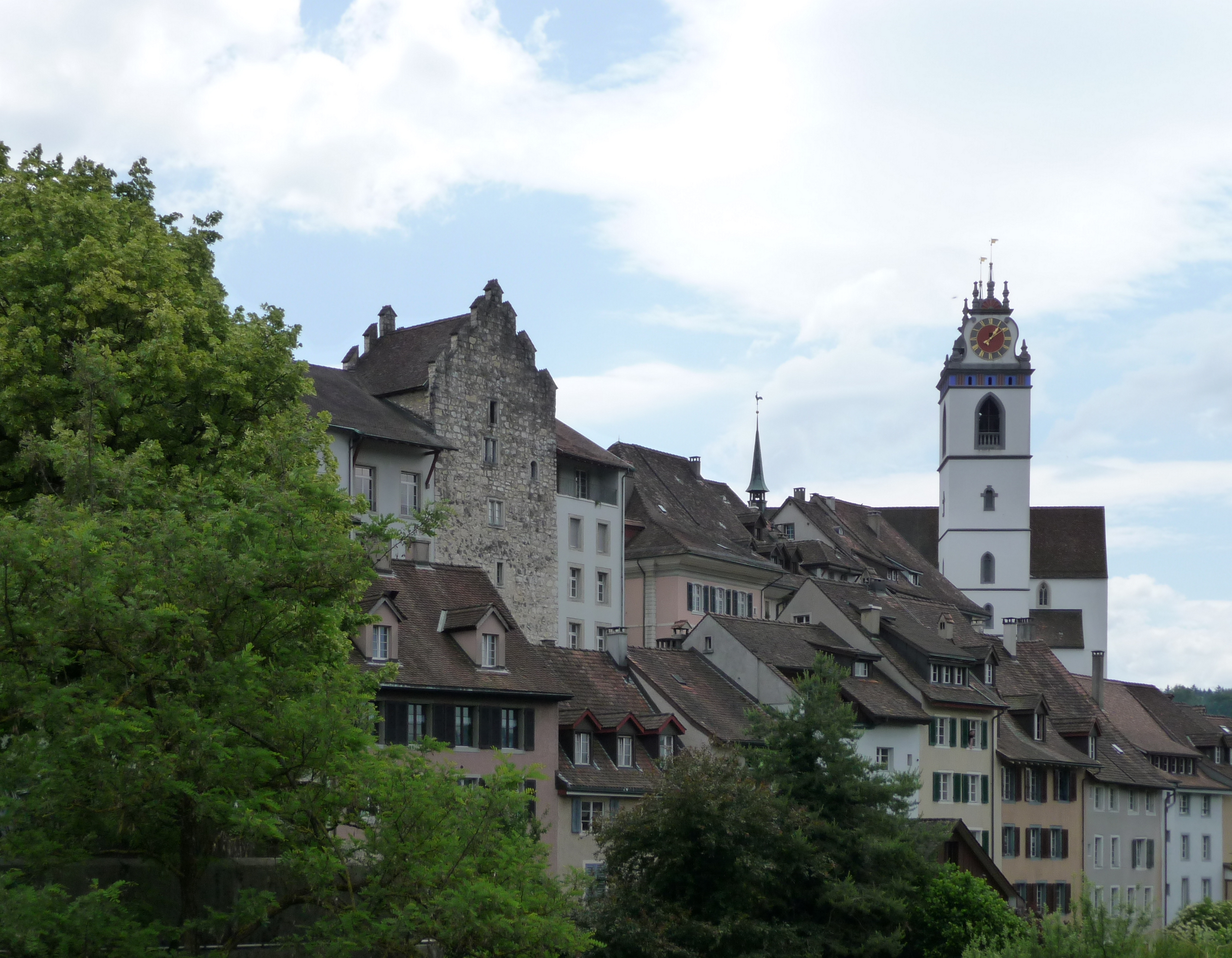 Altstadt von Aarau mit Stadtkirche im Hintergrund